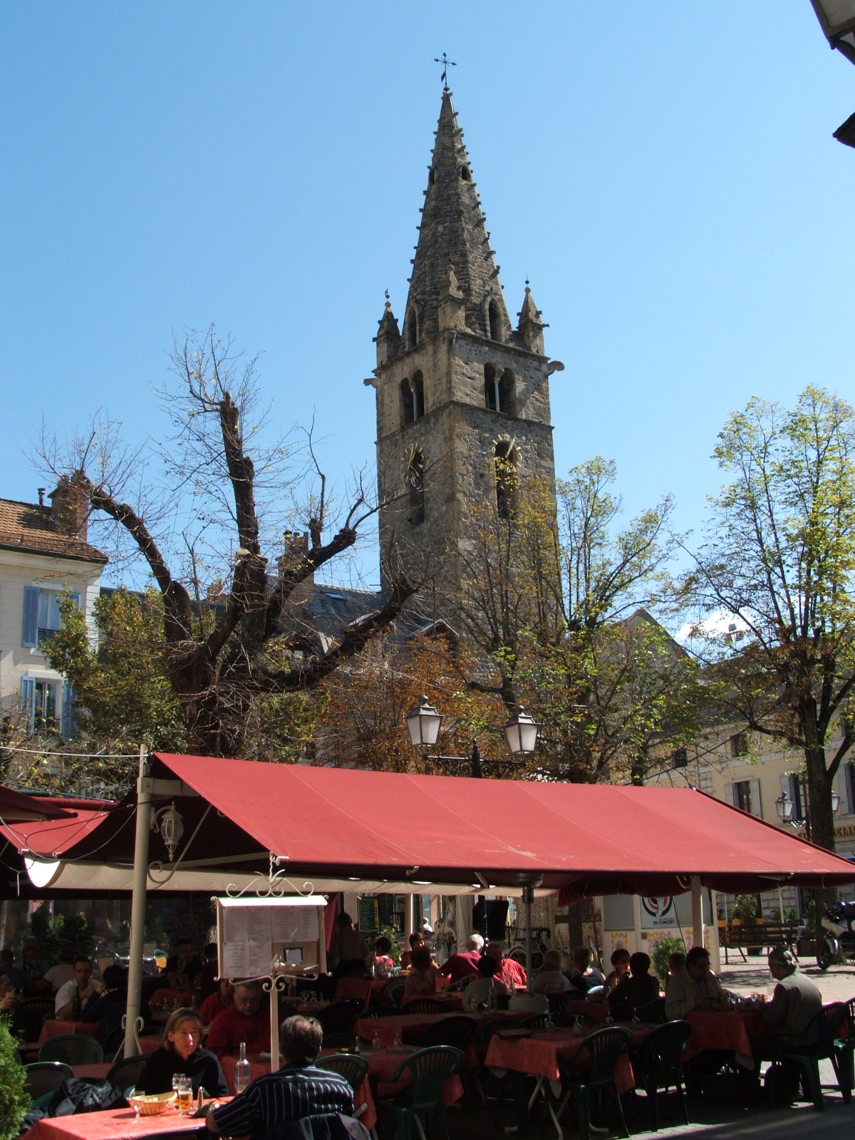 Barcelonnette, département des Alpes-de-Haute-Provence, France